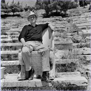 Ο Γιάννης Τσαρούχης γεννήθηκε στον Πειραιά το 1910. Υπήρξε πολύπλευρη προσωπικότητα και όπως έλεγε ο ίδιος, σε όλη του τη ζωή παρέμεινε ένας ερευνητής. Πέρα από ζωγράφος υπήρξε συγγραφέας, μεταφραστής αρχαίων τραγωδιών, σκηνοθέτης, σκηνογράφος και ενδυματολόγος. Φοίτησε στην Αθήνα, στη Σχολή Καλών Τεχνών με δασκάλους τον Ιακωβίδη και τον Παρθένη και μαθήτευσε για ένα διάστημα κοντά στον Κόντογλου. Έπαιξε μεγάλο ρόλο στην αναγνώριση της καλλιτεχνικής αξίας του Θεόφιλου και μαζί με άλλους πνευματικούς ανθρώπους πρωτοστάτησε στο αίτημα της εποχής για την ελληνικότητα στην τέχνη.